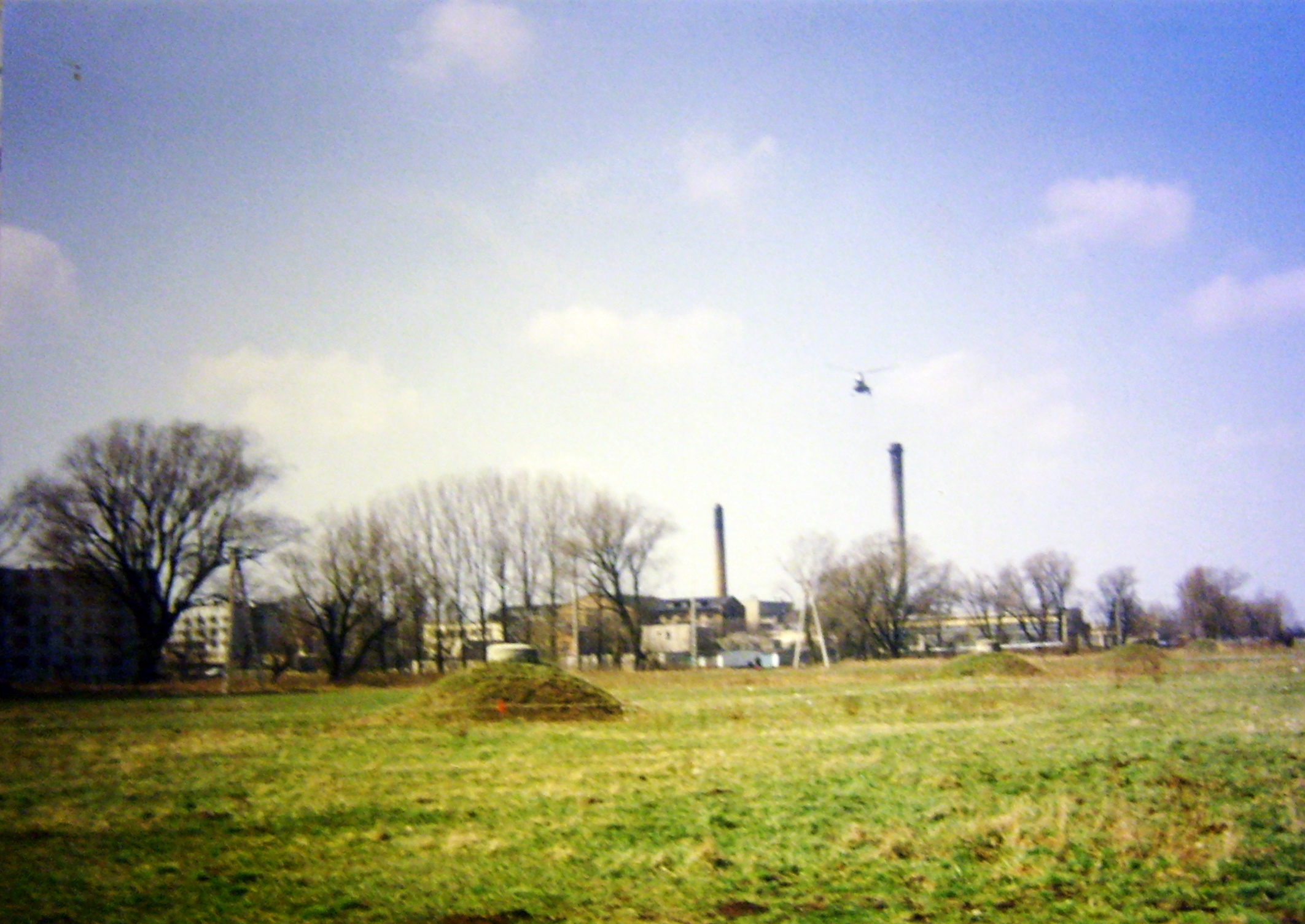 Żychlin, łąki nad Słudwią, EMIT